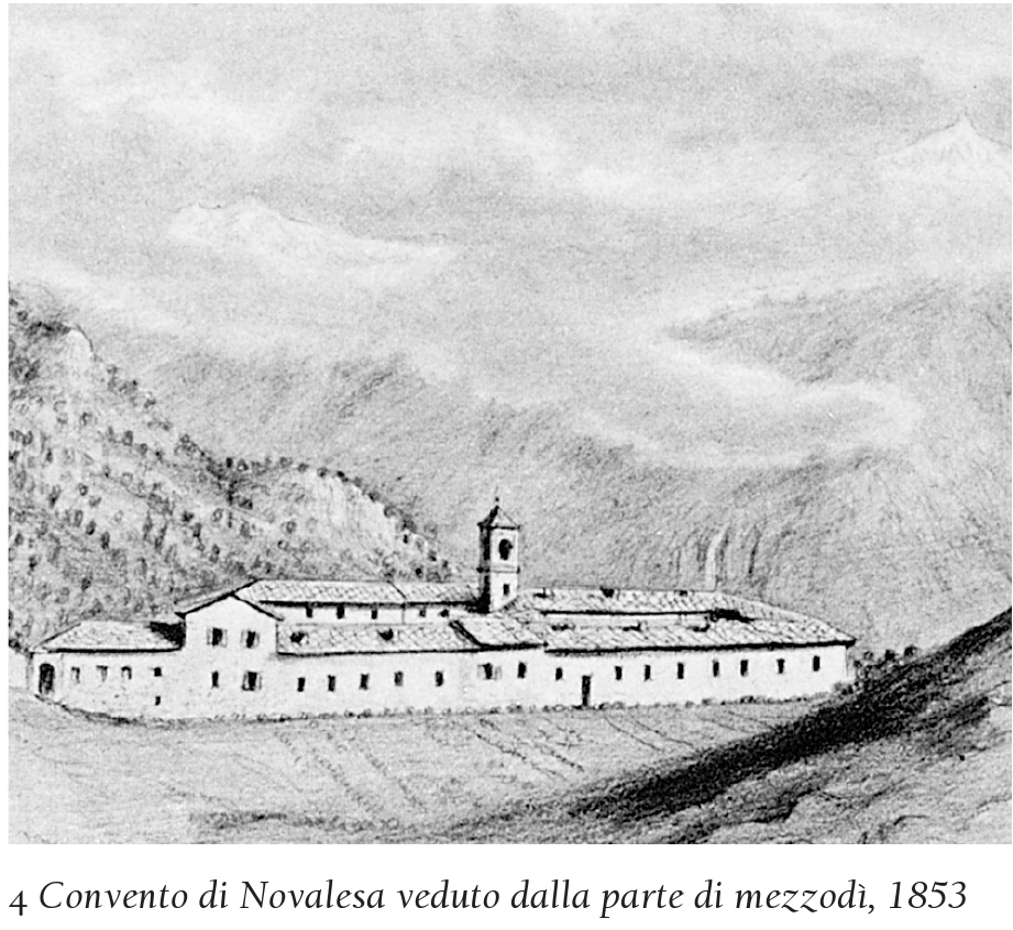 visto dalla parte di mezzodì, 1853